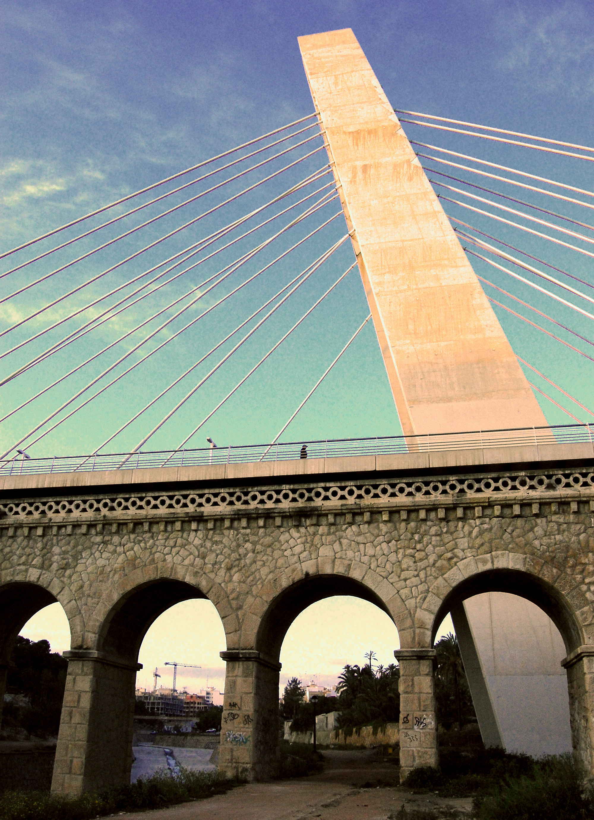 Puente Elche